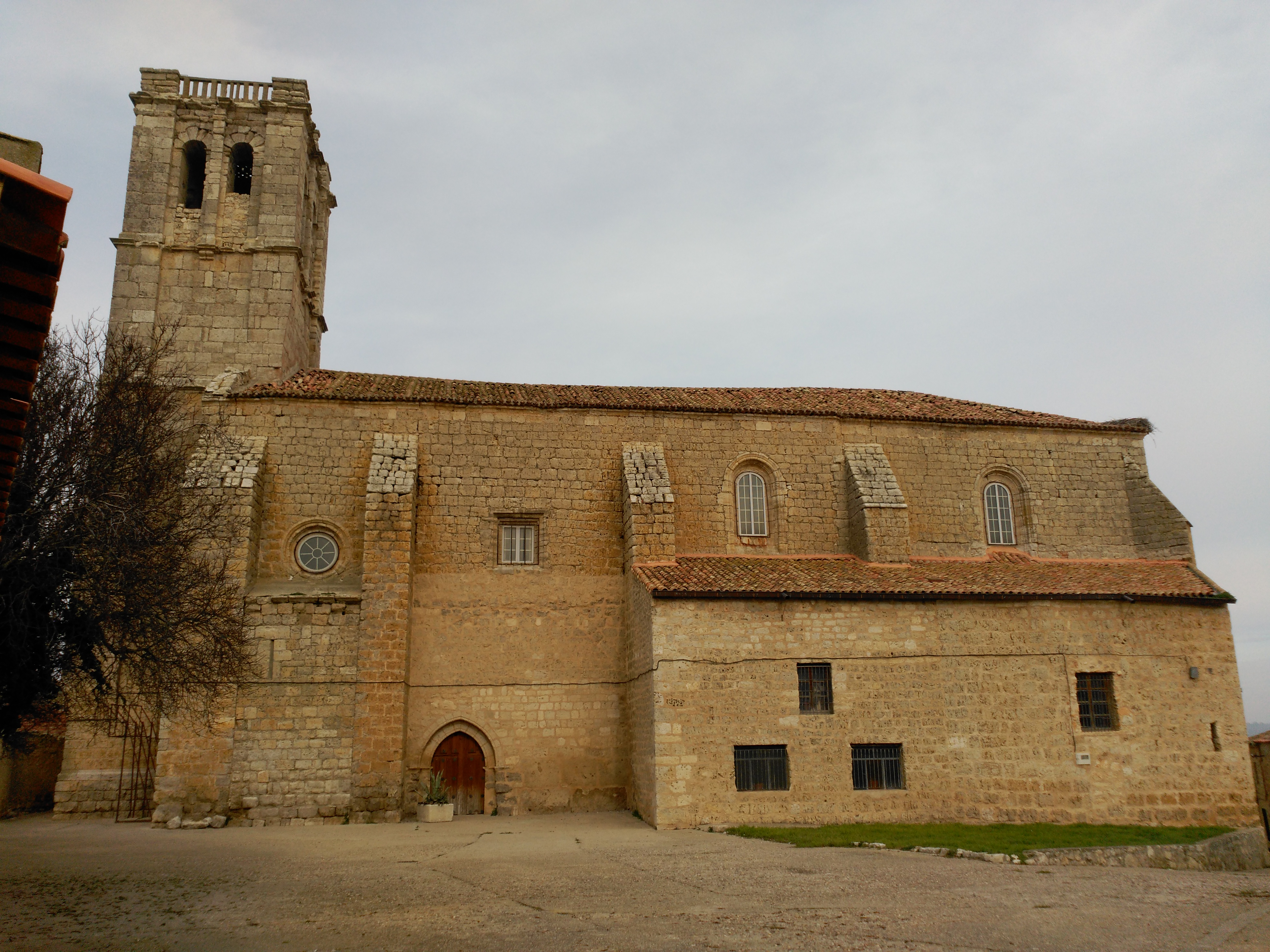 Iglesia parroquial de San Vicente Mártir en Valdenebro de los Valles (Valladolid), vista trasera.